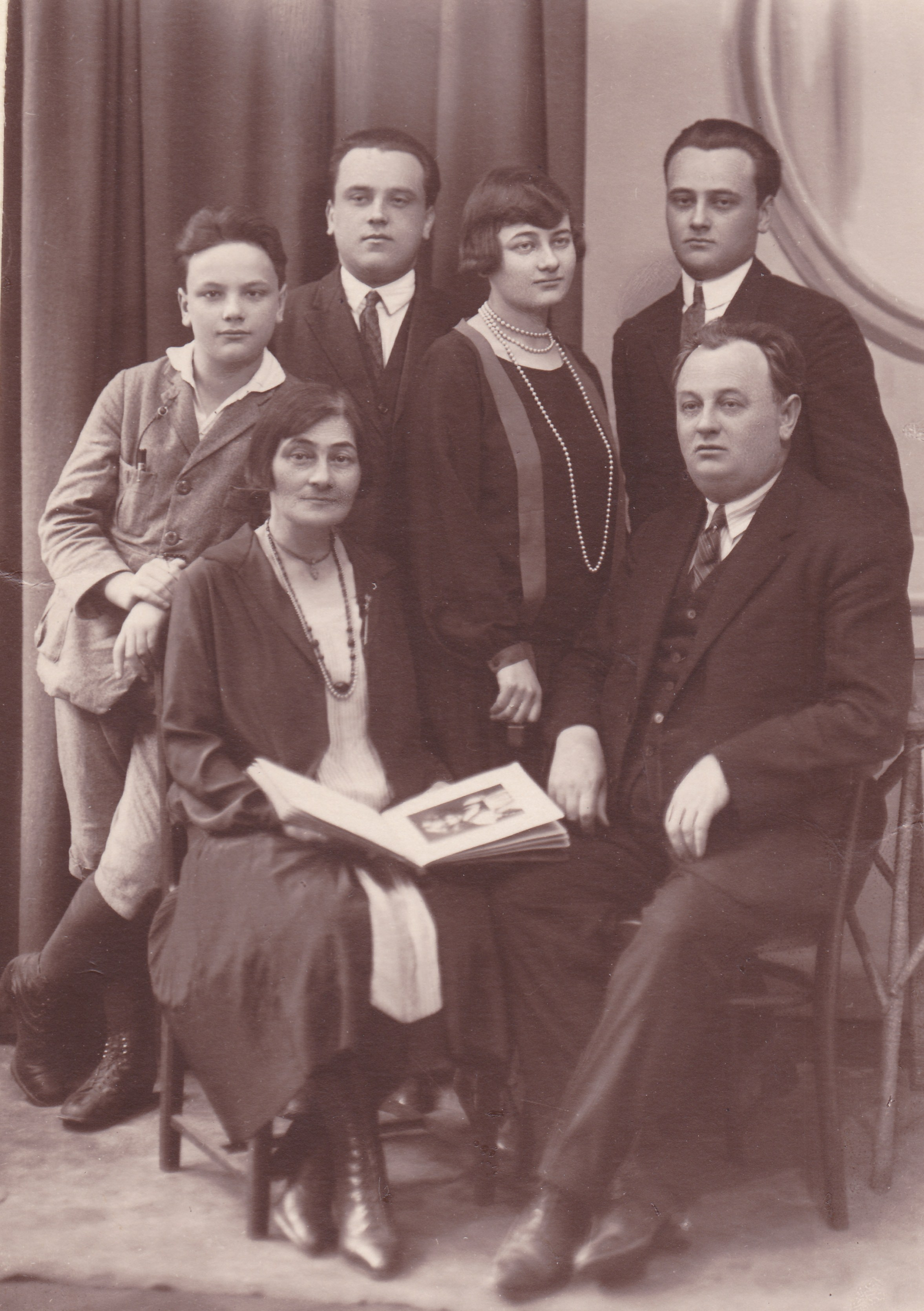 Józef Bogusz, lekarz, u góry po prawej